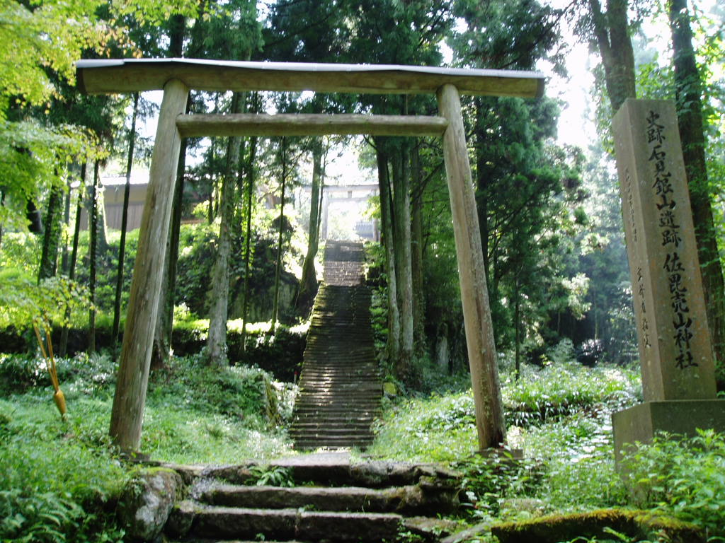 佐毘売山（さひめやま）神社。石見銀山の氏神。島根県大田市